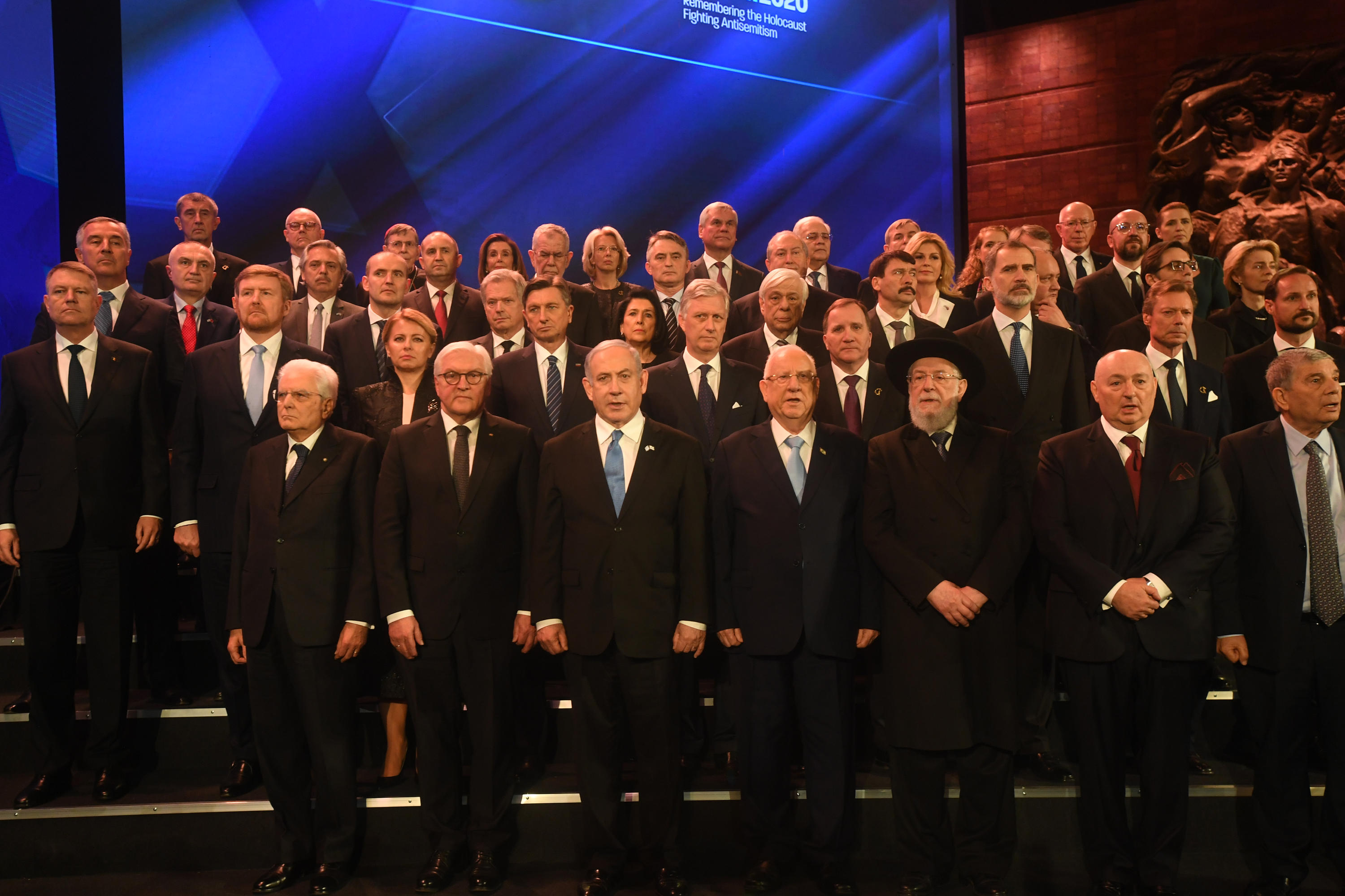 El presidente Alberto Fernández participó del V Foro Mundial del Holocausto «Recordando el Holocausto: combatiendo el antisemitismo».